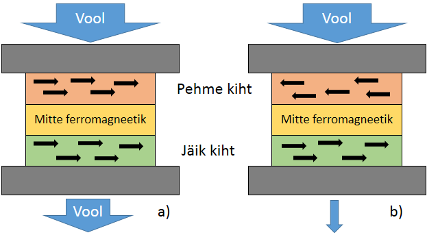 Spinnventiili illustratsioon